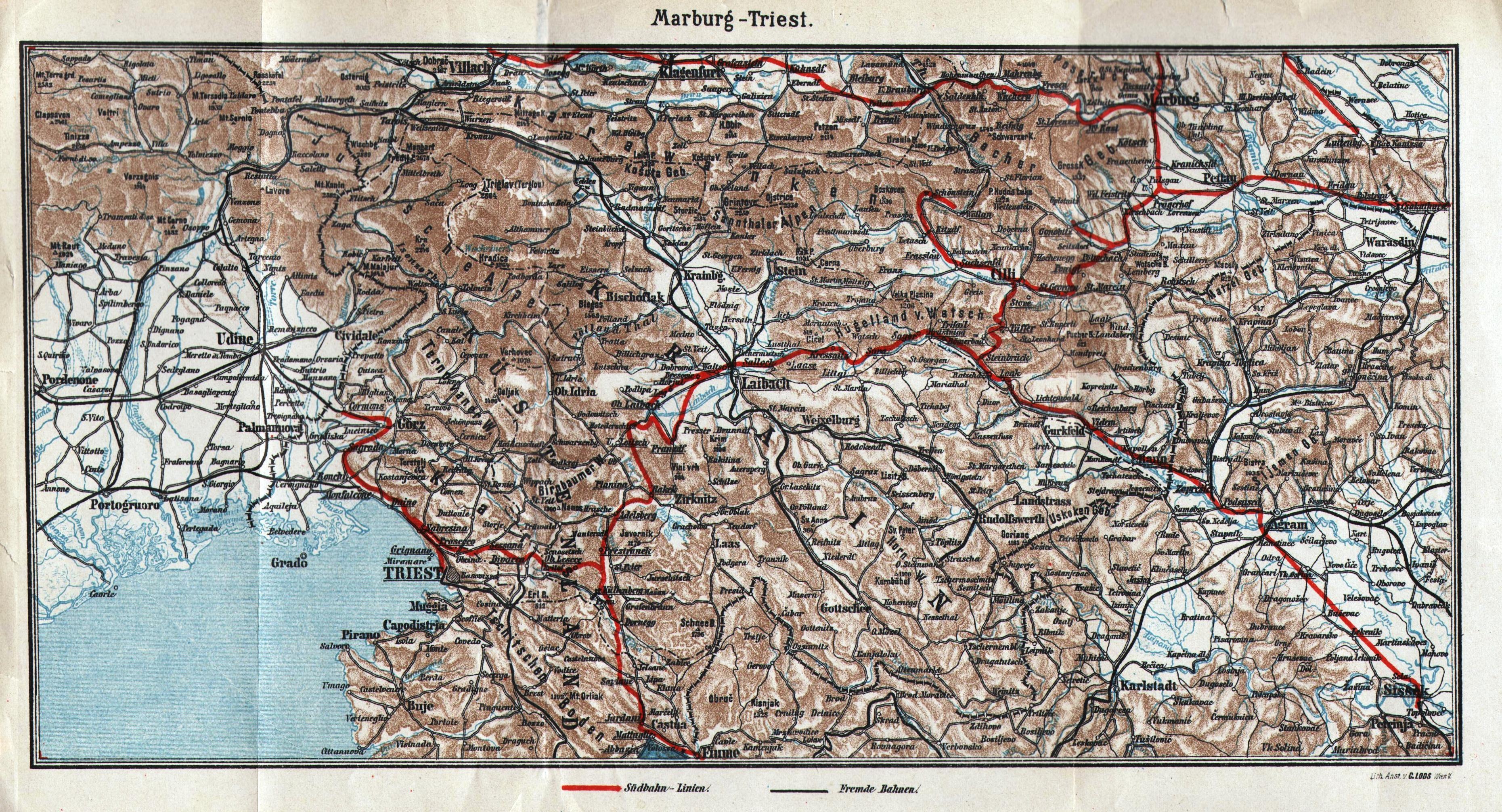 Landkarte der Südbahnstrecke Marburg-Triest